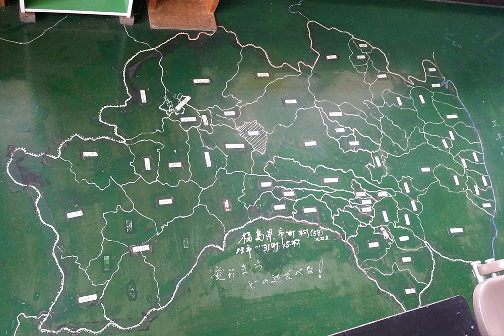 駅舎内の床に描かれた福島県